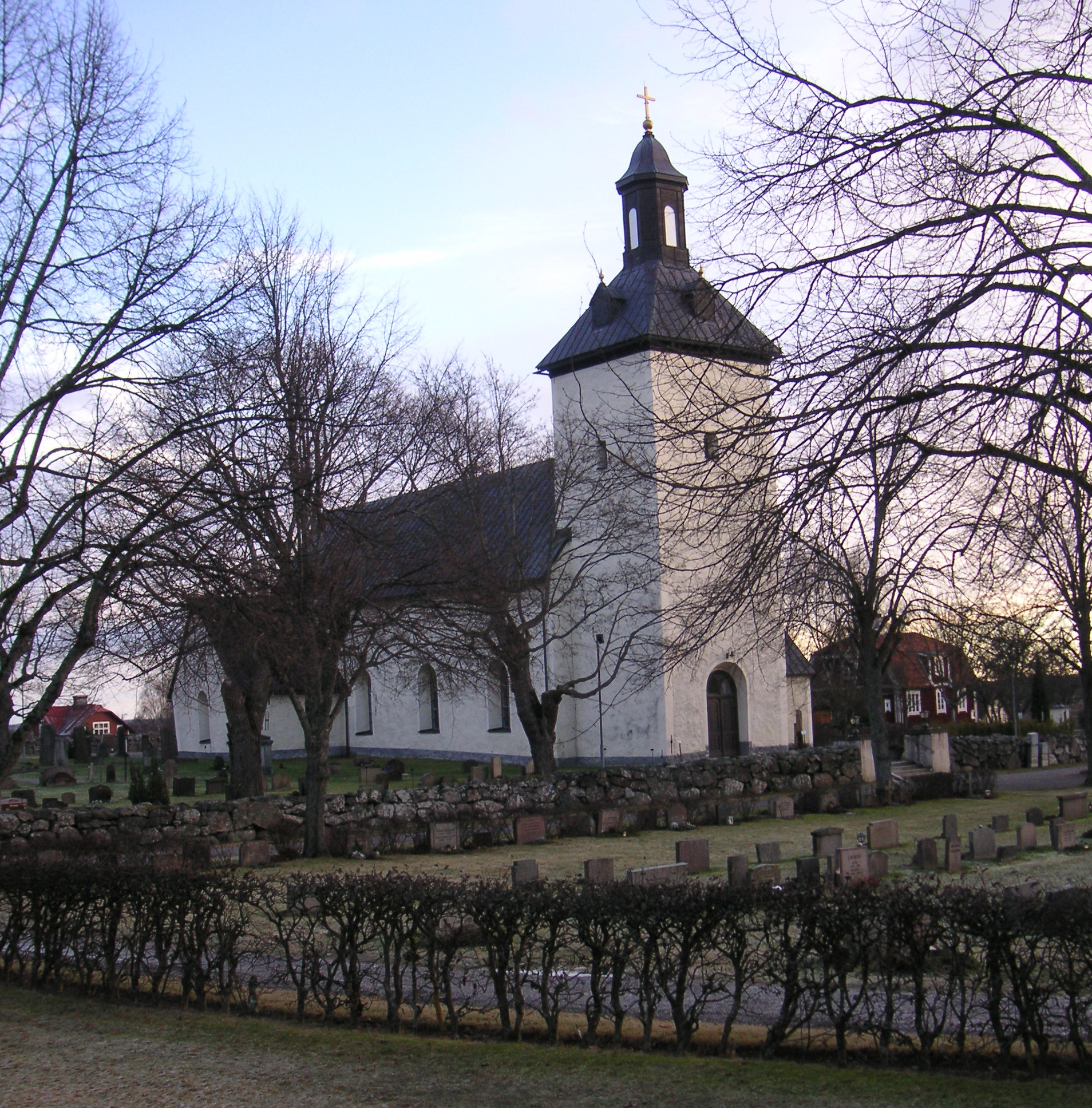 Överjärna Kyrka Julen 2005 foto: Konrad Breidenstein, Järna